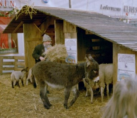 Esslingen - Weihnachtskrippe Fotografiert: selbst